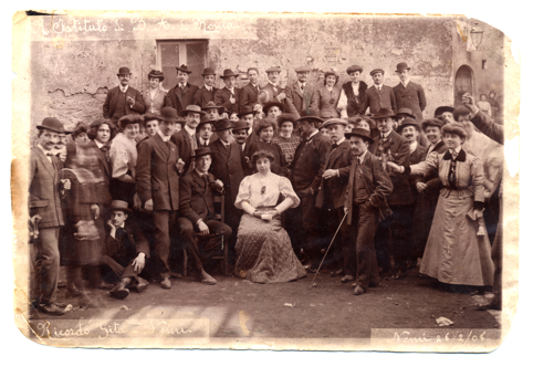 Ricordo della gita di pensionato (1908)